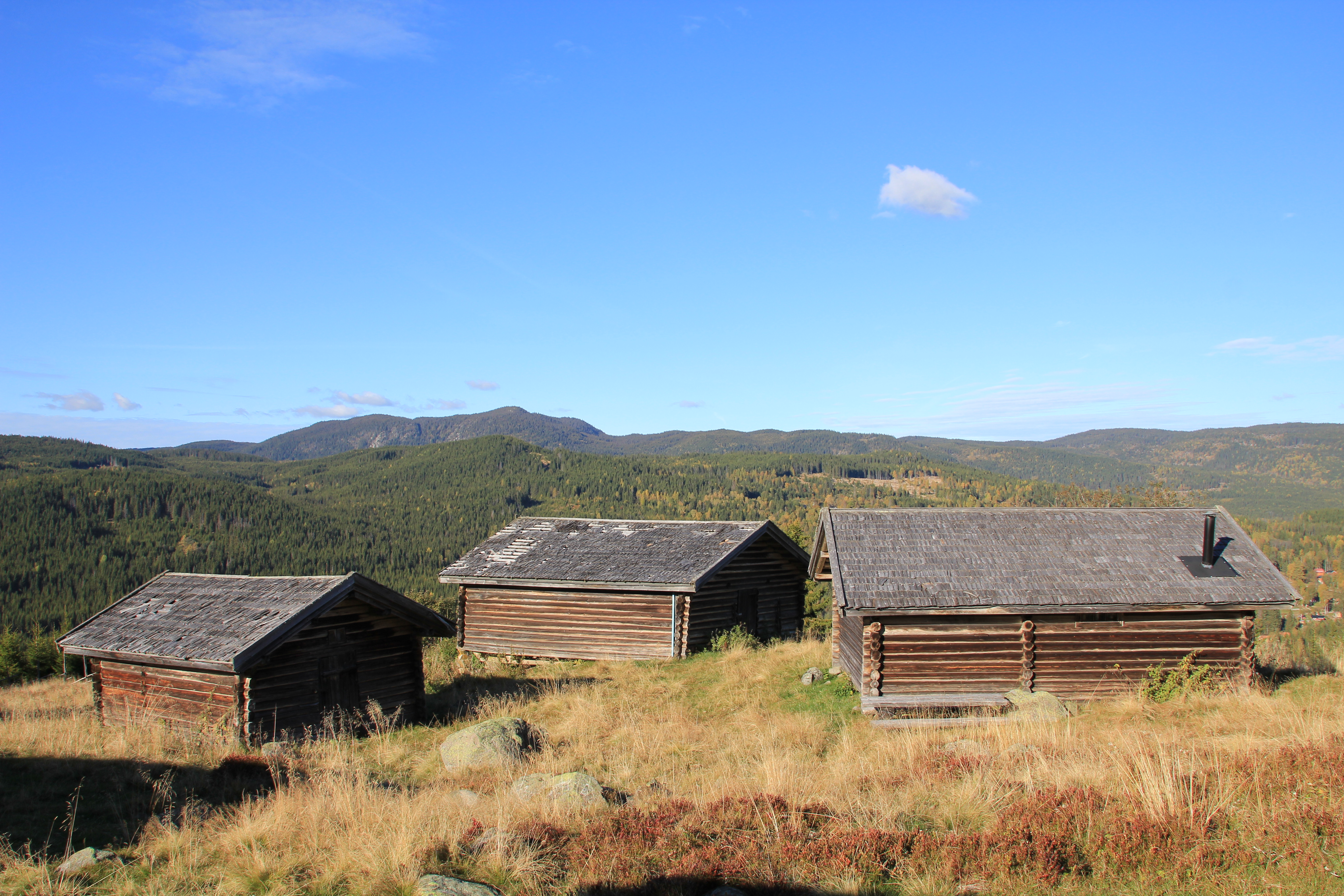 Knaisetra er den best bevarte setra i Akershus, beliggende i Hurdal kommune.